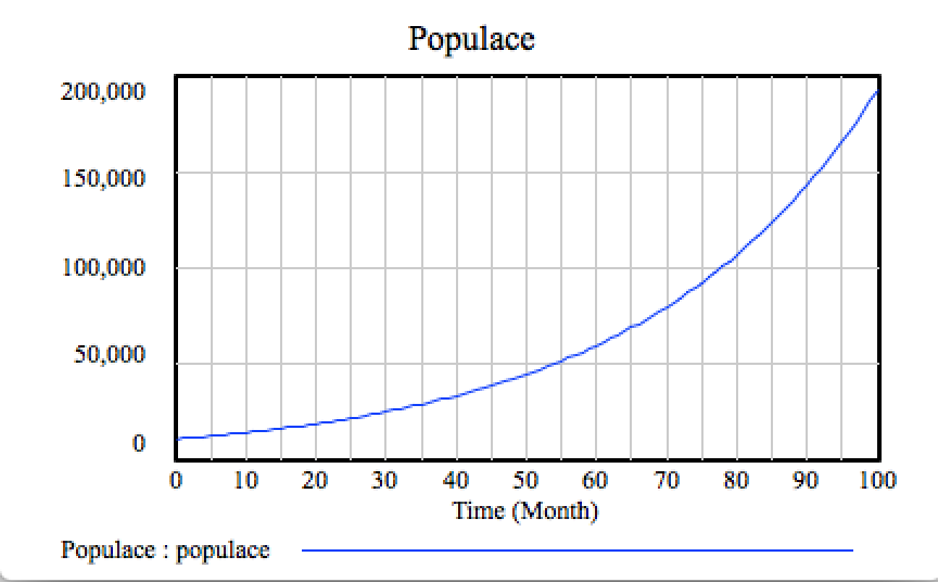 Graf simulace zivotniho cyklus SFD, Vensim, varianta zivota